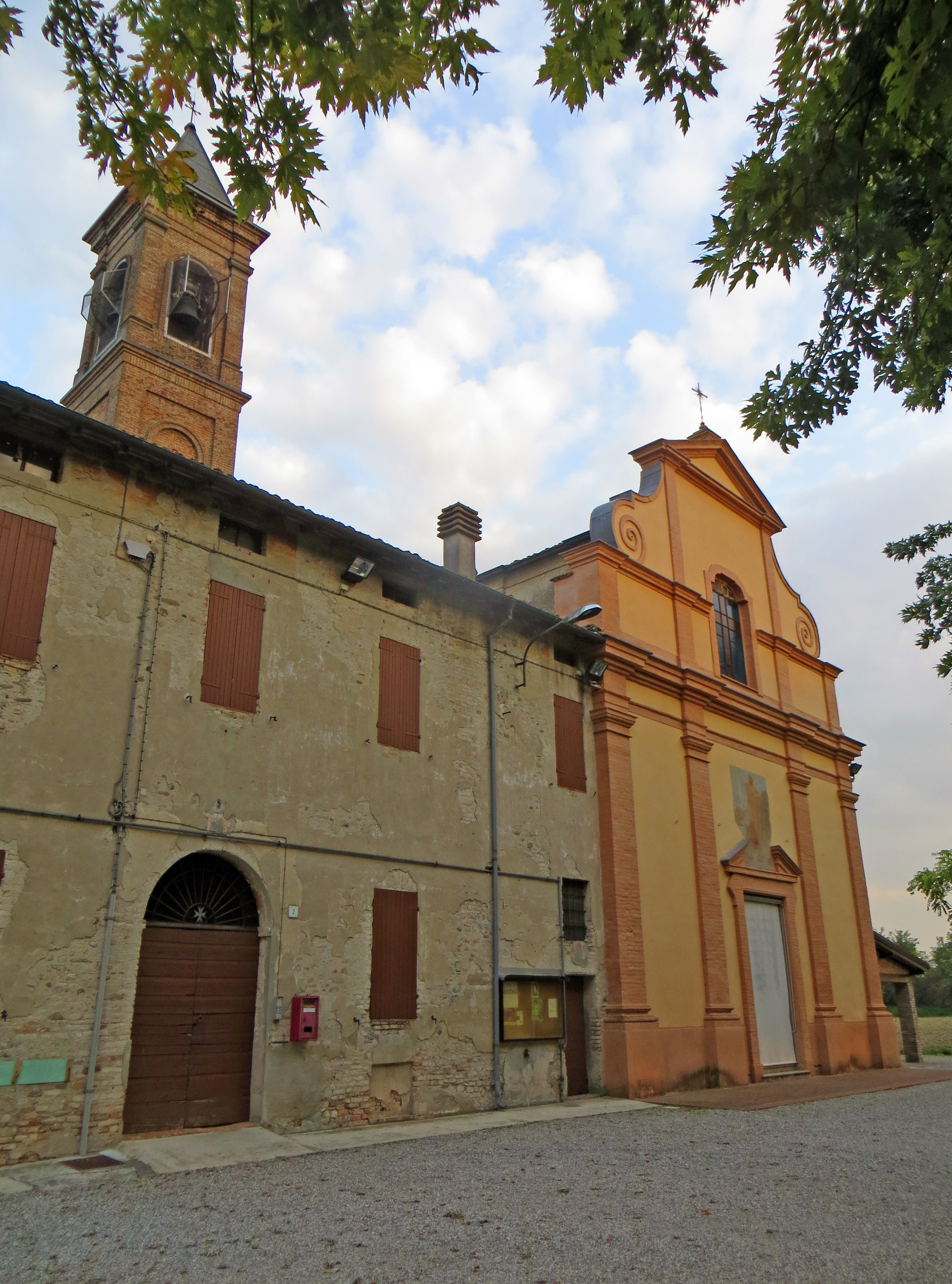 Chiesa dei Santi Giovanni Battista e Lorenzo (Bianconese, Fontevivo) - facciata e canonica